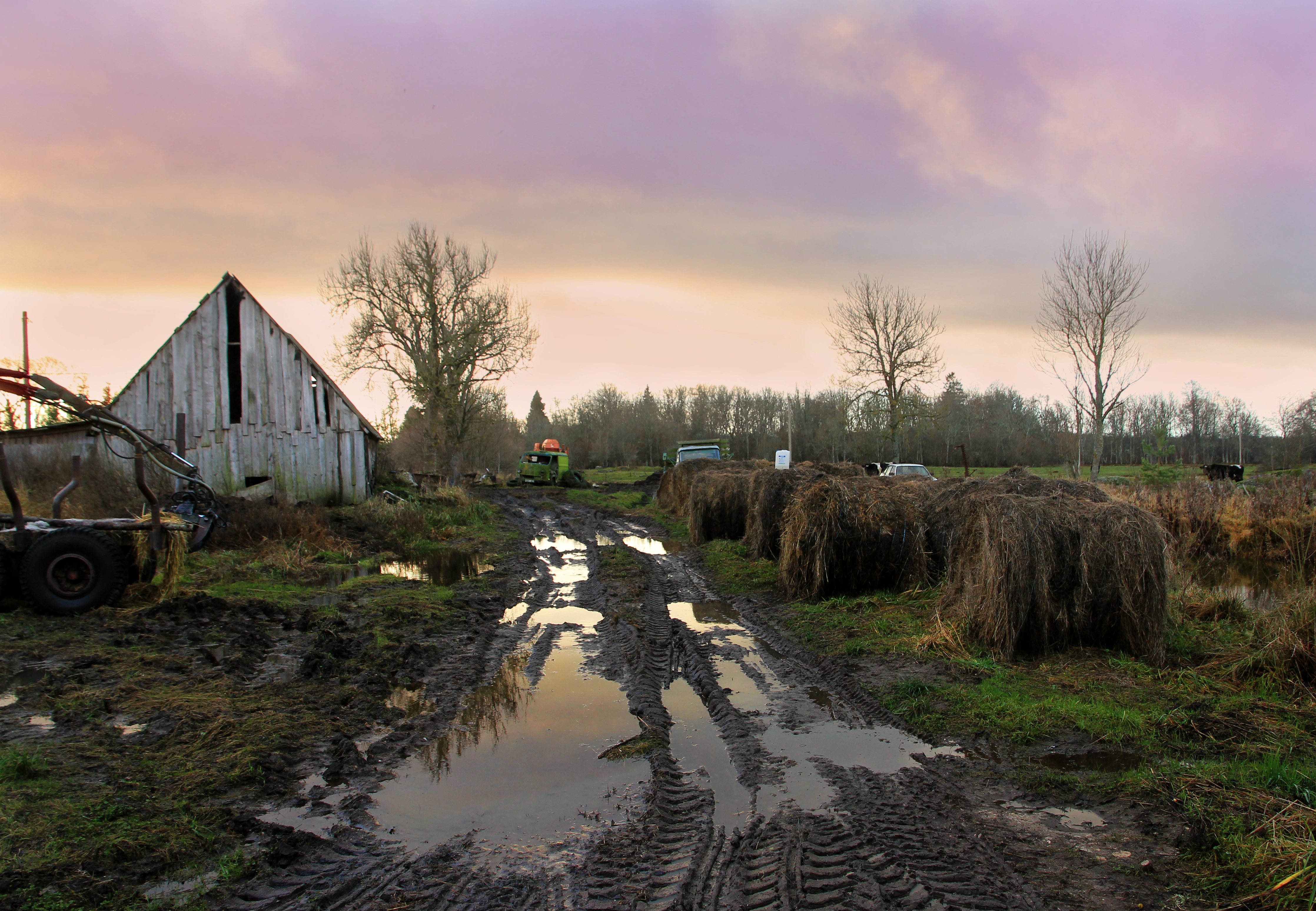 Ridala vald.Sügis taluhoovis